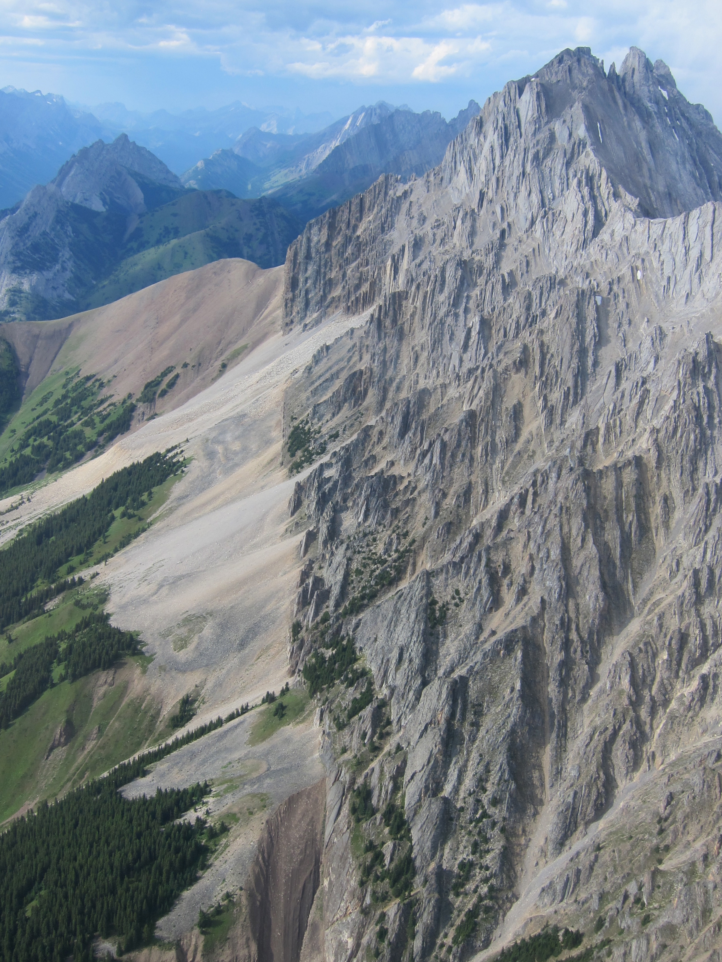 Ridge and peak of Mist Mountain, Kananaskis Range, Alberta, Canada